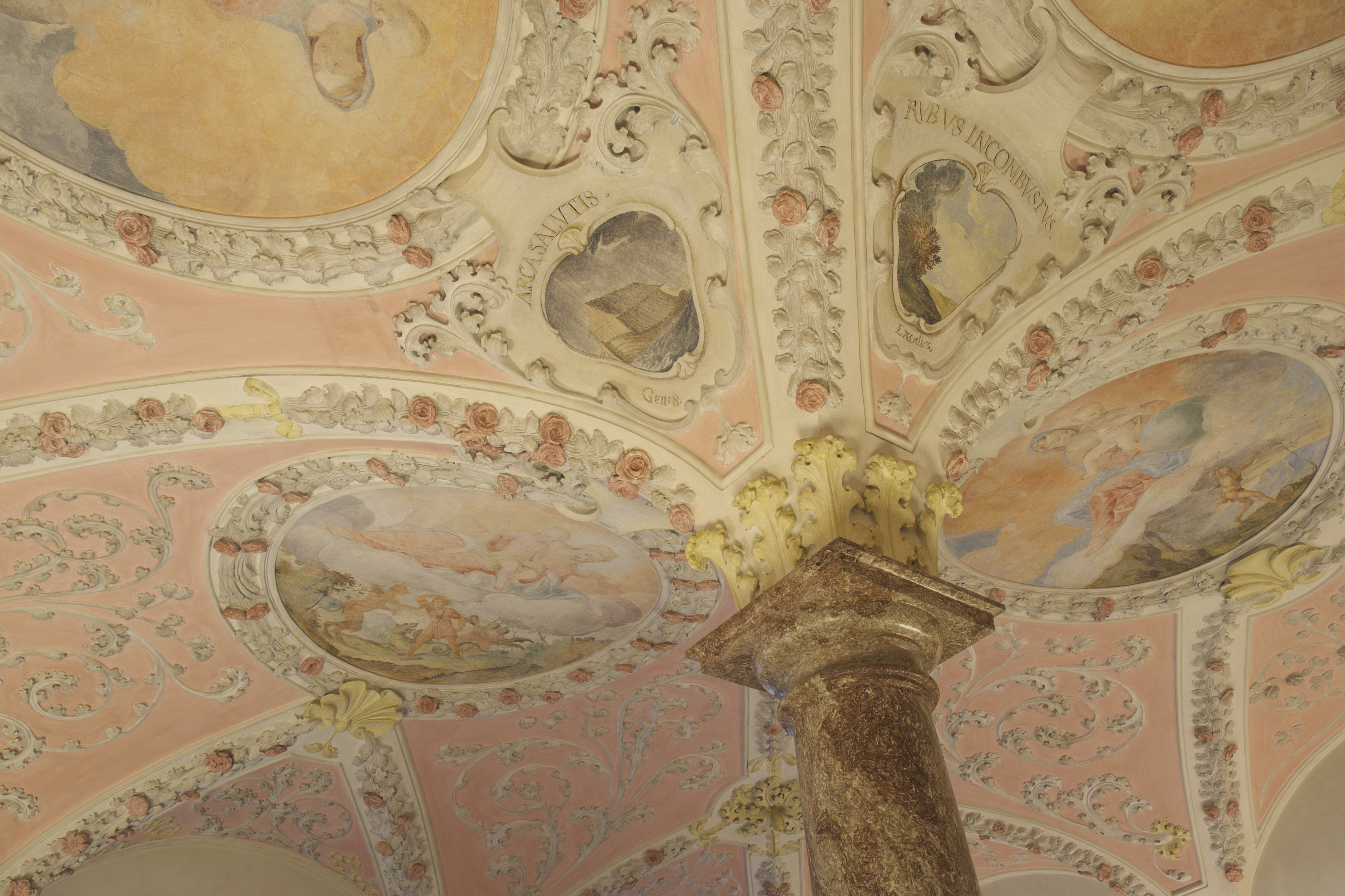 Lesesaal des Archivs des Erzbistums München und Freising, Sakristei der ehemaligen Karmelitenkirche St. Nikolaus am Promenadeplatz in der Altstadt im Stadtbezirk Altstadt-Lehel in München (Bayern/Deutschland), Ausstattung um 1710, Stuck von Francesco Marazzzo, Fresken von Johann Anton Gumpp